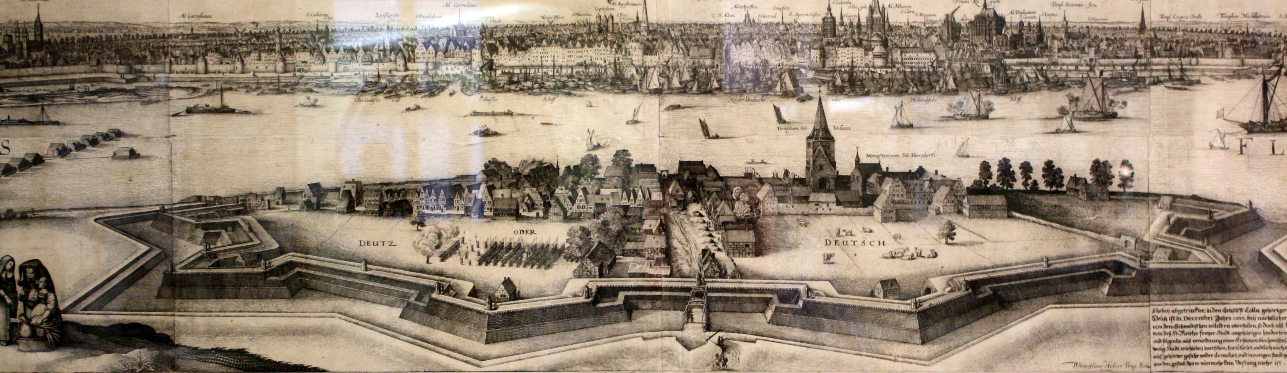 Köln und Deutz um 1636, nach Hollar von Prachna, Wenceslaus, österreichischer Kupferstecher, Radierer (1607-1677). Das Bild zeigt: Am Rhein das Kloster St. Heribert, die Kirche St. Urban, sowie eine weitere kleine Kirche